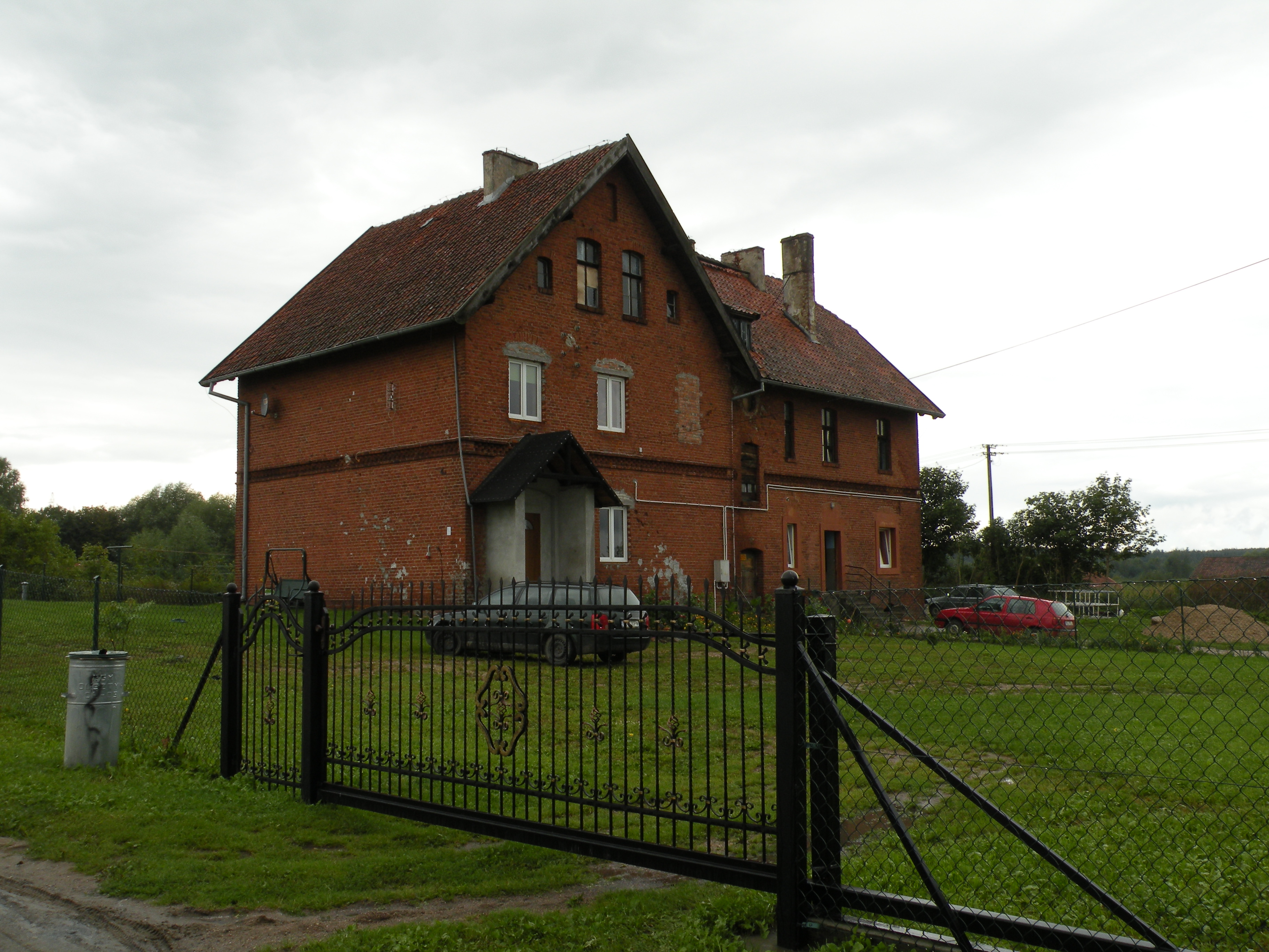 Dąbrówka Wielka, skrtaj wsi. Budynek prywatny, ale układ architektoniczny wskazuje, że mogła to być szkoła lub inny budynek uzyteczności publicznej.